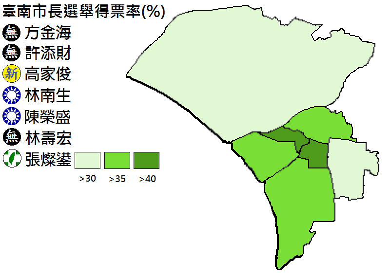 1997年臺南市長選舉